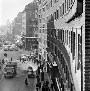 Kungsgatan västerut från kv. Oxhuvudet, vid korsningen Sveavägen. Till höger Centrumhusets fasad, Kungsgatan 32-38